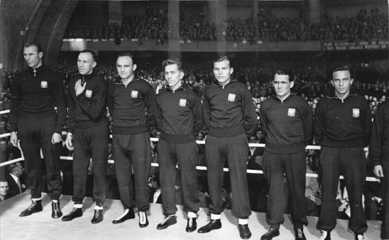 Breslau, polnischen Boxmannschaft Illus V Hein.-Leu. 25.10.50 Internationale Boxkämpfe Polen-Finnland. Finnische Boxer besuchten im Oktober 1950 die Republik Polen. Zwei Boxveranstaltungen fanden statt; die eine am 8.10.1950 in Wrocław. Sie wurde mit 12:4 von den polnischen Boxern gewonnen.Die zweite Veranstaltung endete mit einem 8:4 Sieg der II. polnischen Boxmannschaft. UBz:Die ponischen Boxer in Wroclaw. V...n.r.: 1.) Drapala, Schwergewicht 2.) Szymura, Halbschwergewicht 3.) Nowara, Mittelgewicht 4.) Zygmunt Chychła, Weltergewicht 5.) Sadowski, Leichtgewicht 6.) Aleksy Antkiewicz, Federgewicht 7.) Faska, Bantamgewicht.